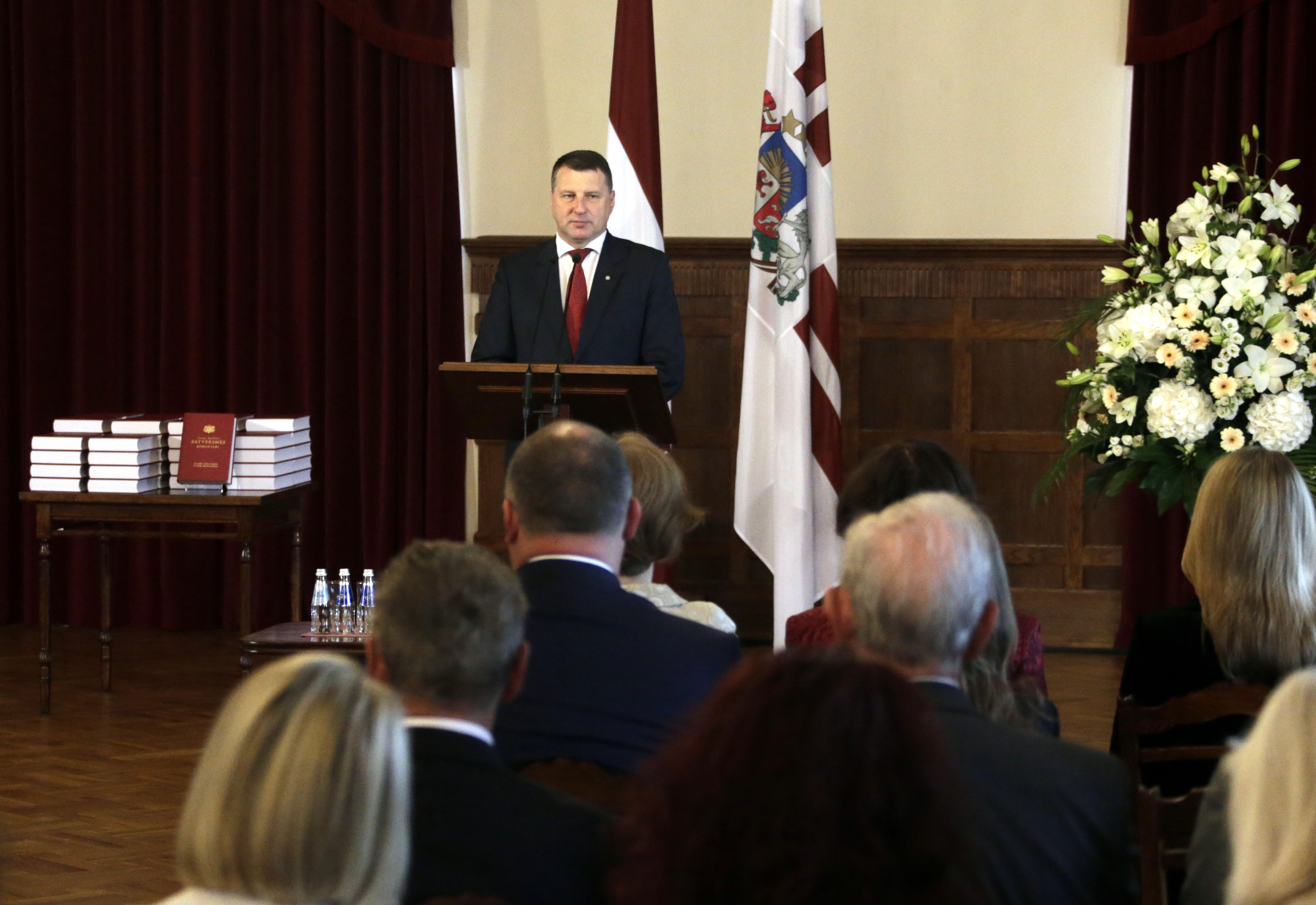 Valsts prezidents Raimonds Vējonis 31.05.2017. atklāj Satversmes komentāru ceturto sējumu Foto: Valsts Prezidenta kanceleja